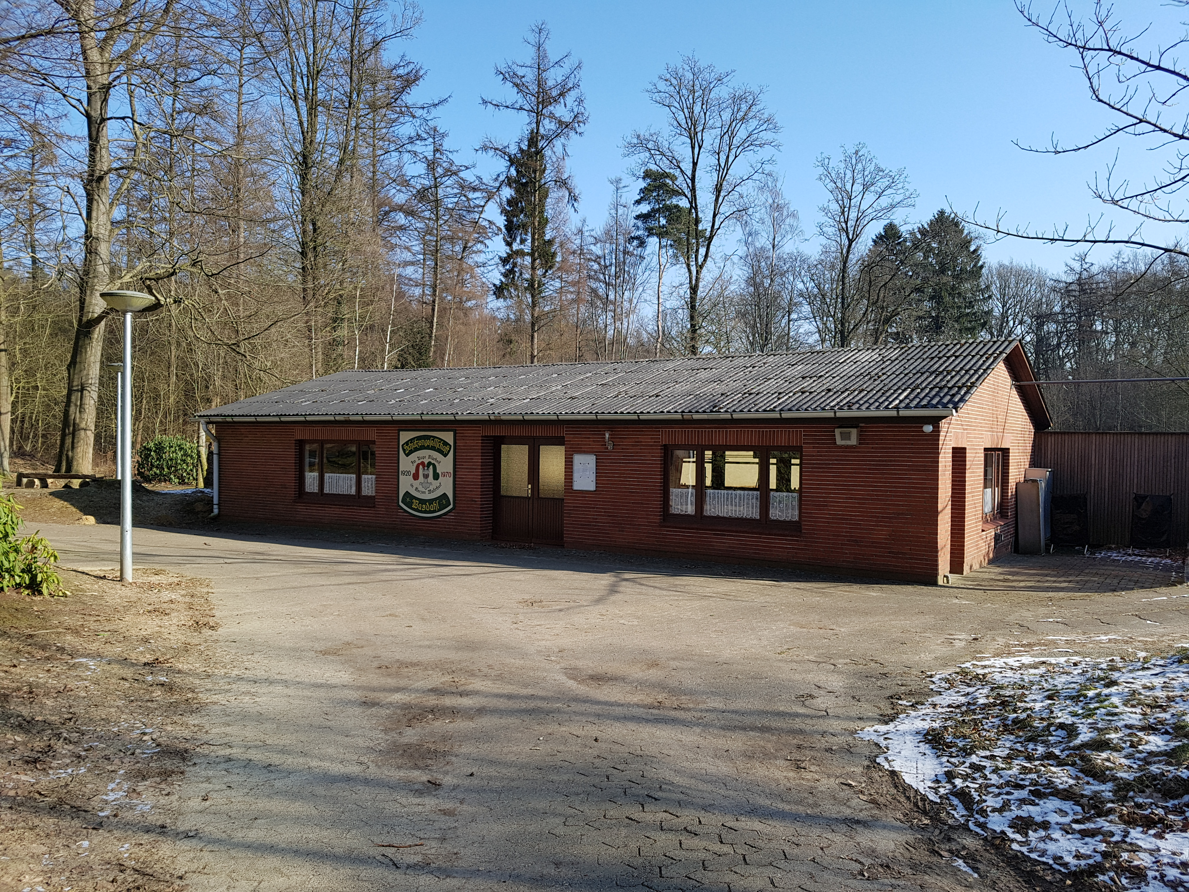 Dat Schüttenhuus in Basdaal